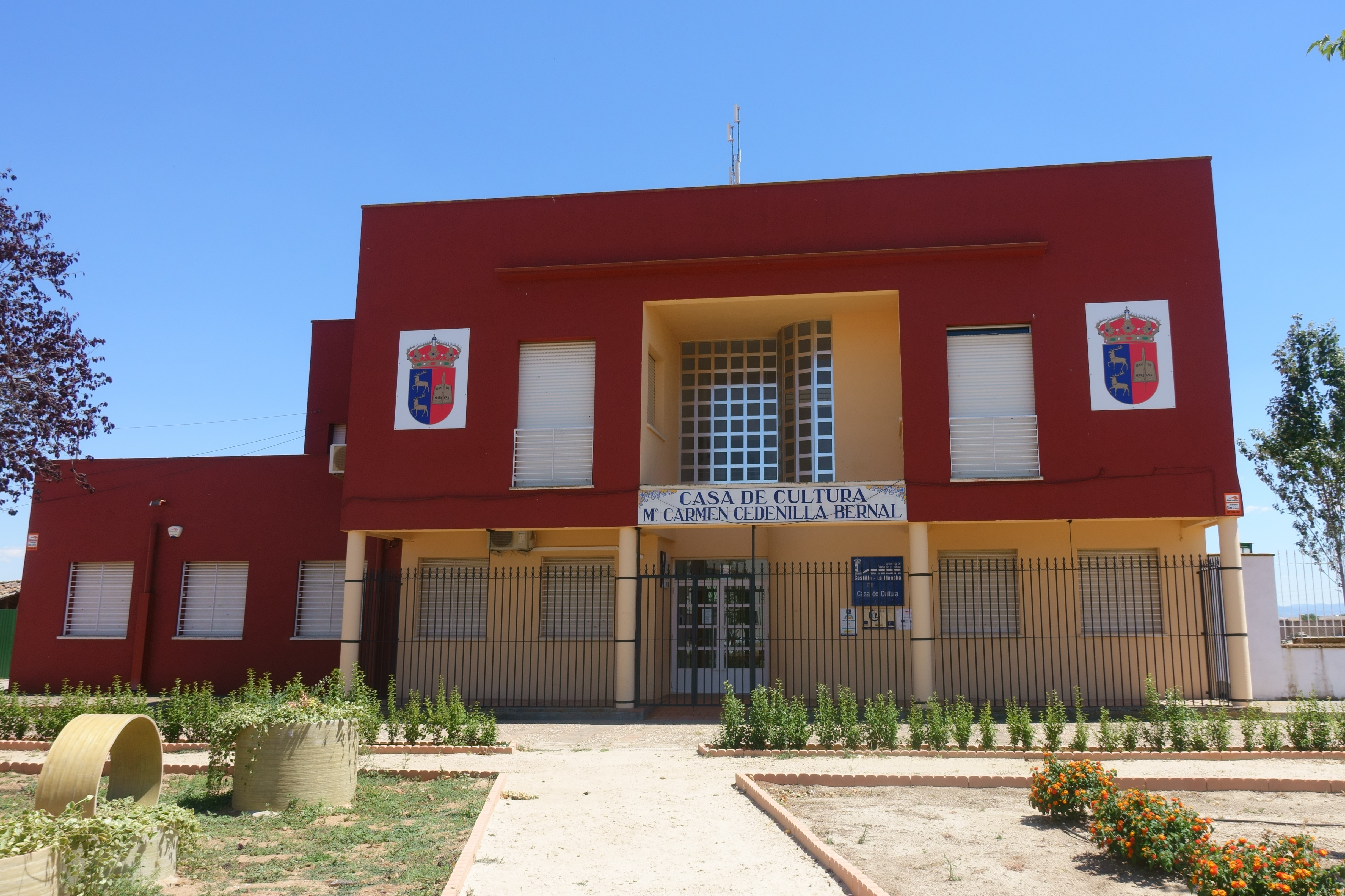 Casa de Cultura de La Pueblanueva (Toledo, España).